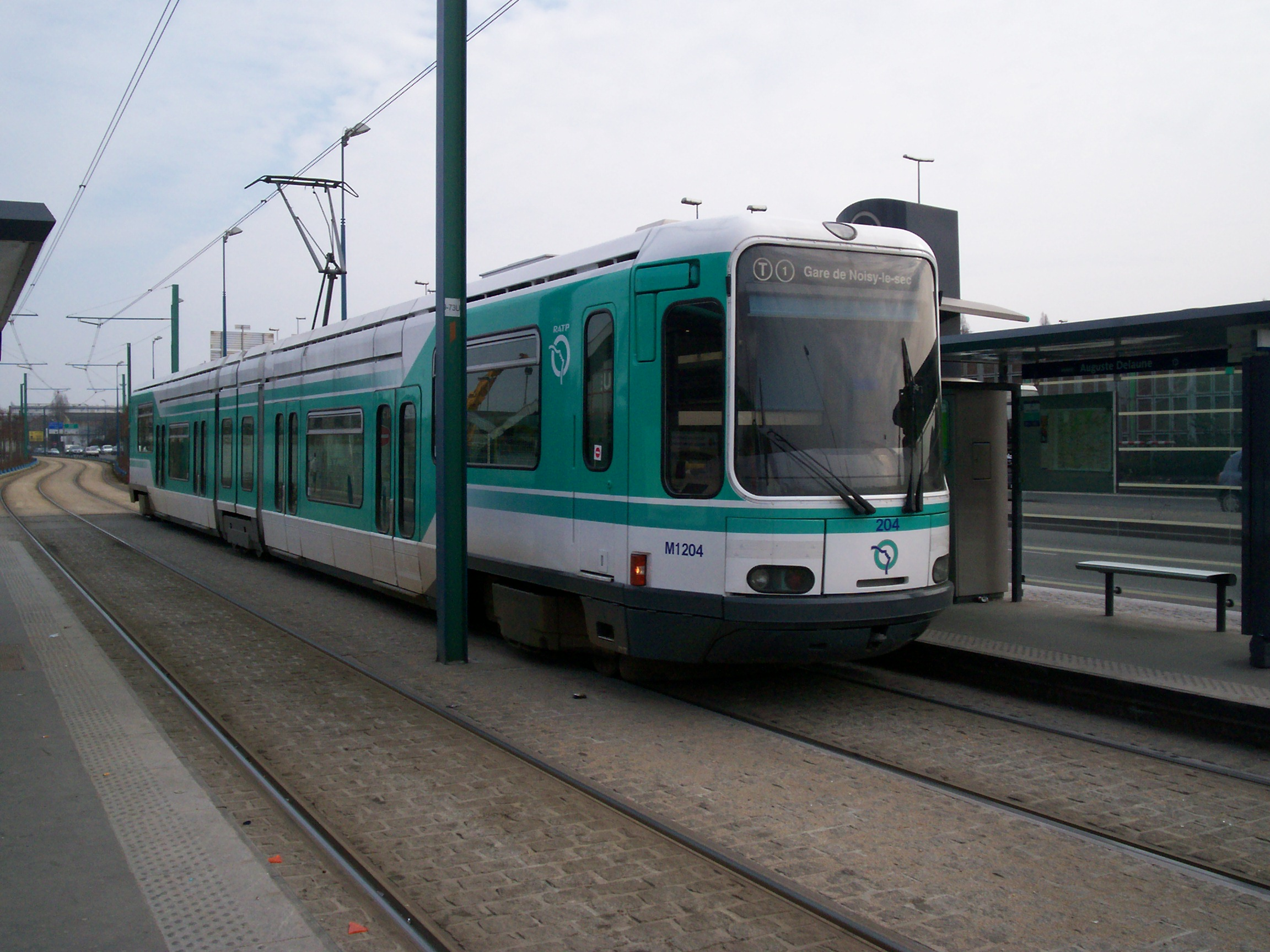 T1 à Auguste Delaune